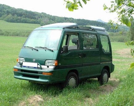 Subaru Libero novější verze vyráběná od roku 1993 do roku 1997 Autor: peple, převzato s jeho souhlasem